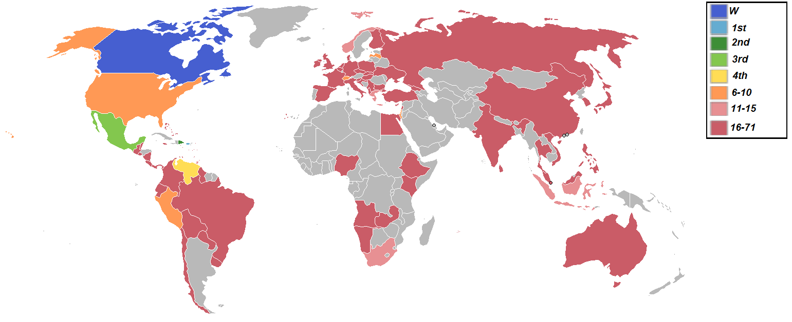 cinco